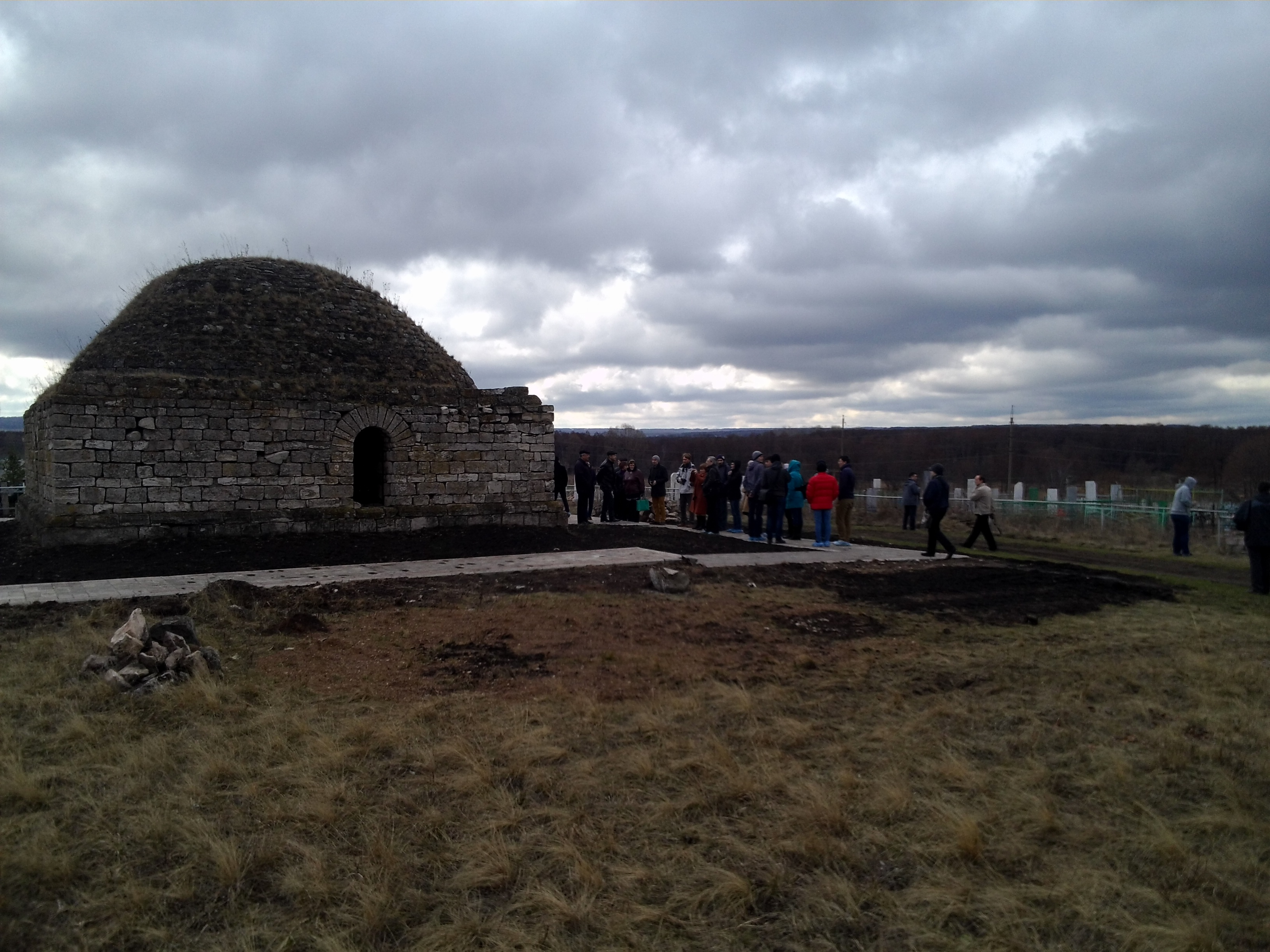 Мавзолей Хусейн-бека (Республика Башкортостан, посёлок Чишмы, восточная окраина поселка, левый берег р. Дема)